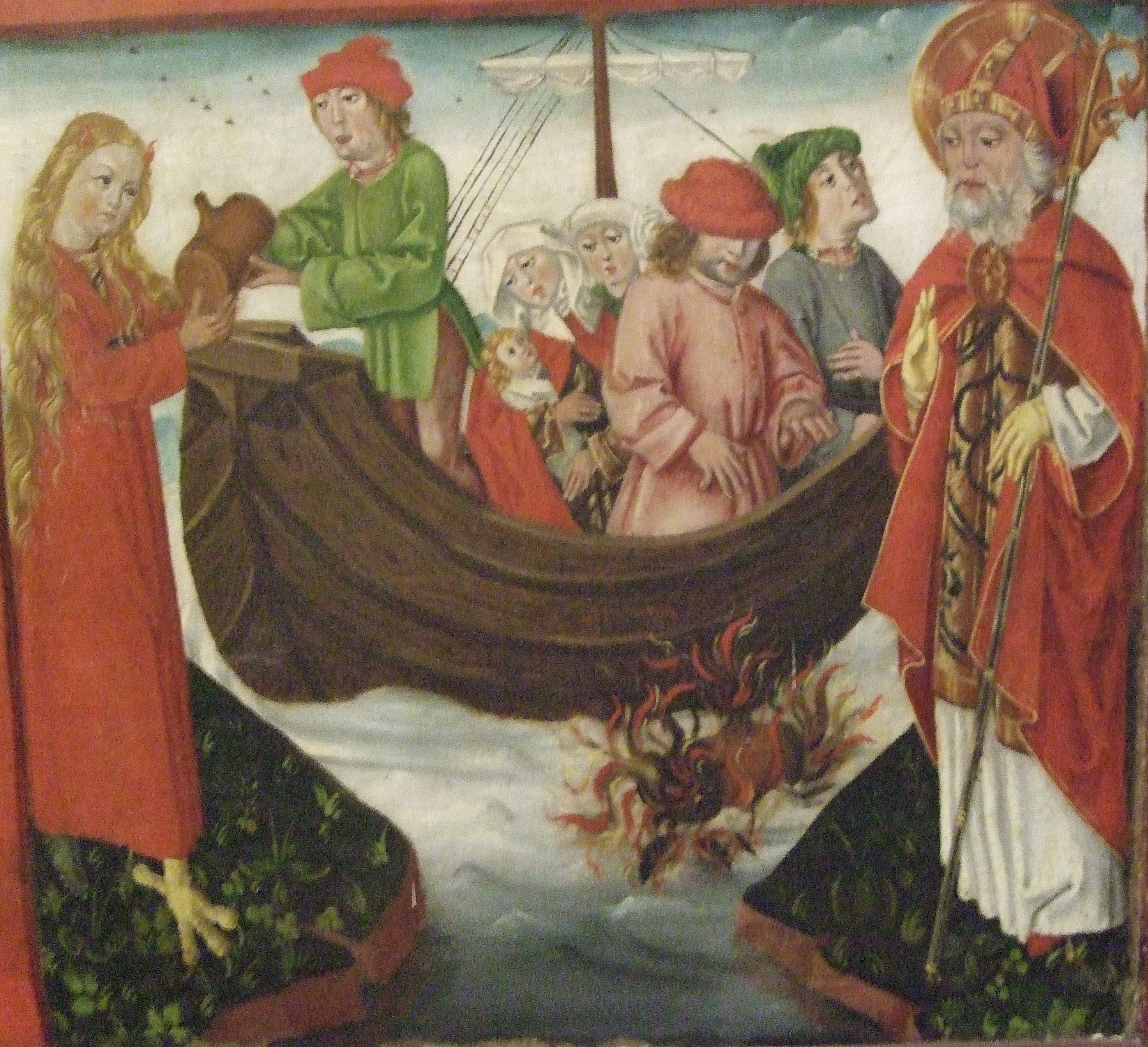 Von einem nicht mehr vollständig erhaltenen Nikolaus-Flügelaltar aus der Zeit um 1485, befinden sich an der Nordwand des Chores in der Kirche St. Mariae in Mühlhausen - Thüringen, die zwei restlichen Seitentafeln, auf denen zwölf Szenen aus dem Leben des Heiligen dargestellt werden.Hier eine Szene mit dem Heiligen Nikolaus, wie der Heilige die Teufelin Diana entlarvt, die in Gestalt einer frommen Frau einen Anschlag auf die Kirche des Heiligen mit Öl vorbereitet, das auf Stein und Wasser brennt. Sie gibt es Pilgern mit dem Auftrag, damit die Wände der Kirche zu bestreichen. Nikolaus erscheint, erkennt die Teufelin und lässt das Öl ins Wasser gießen, wo es verbrennt.